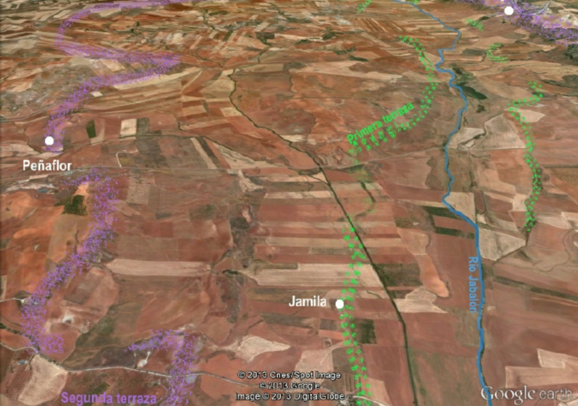 imagen del google earth del Alto valle del río Jabalón.